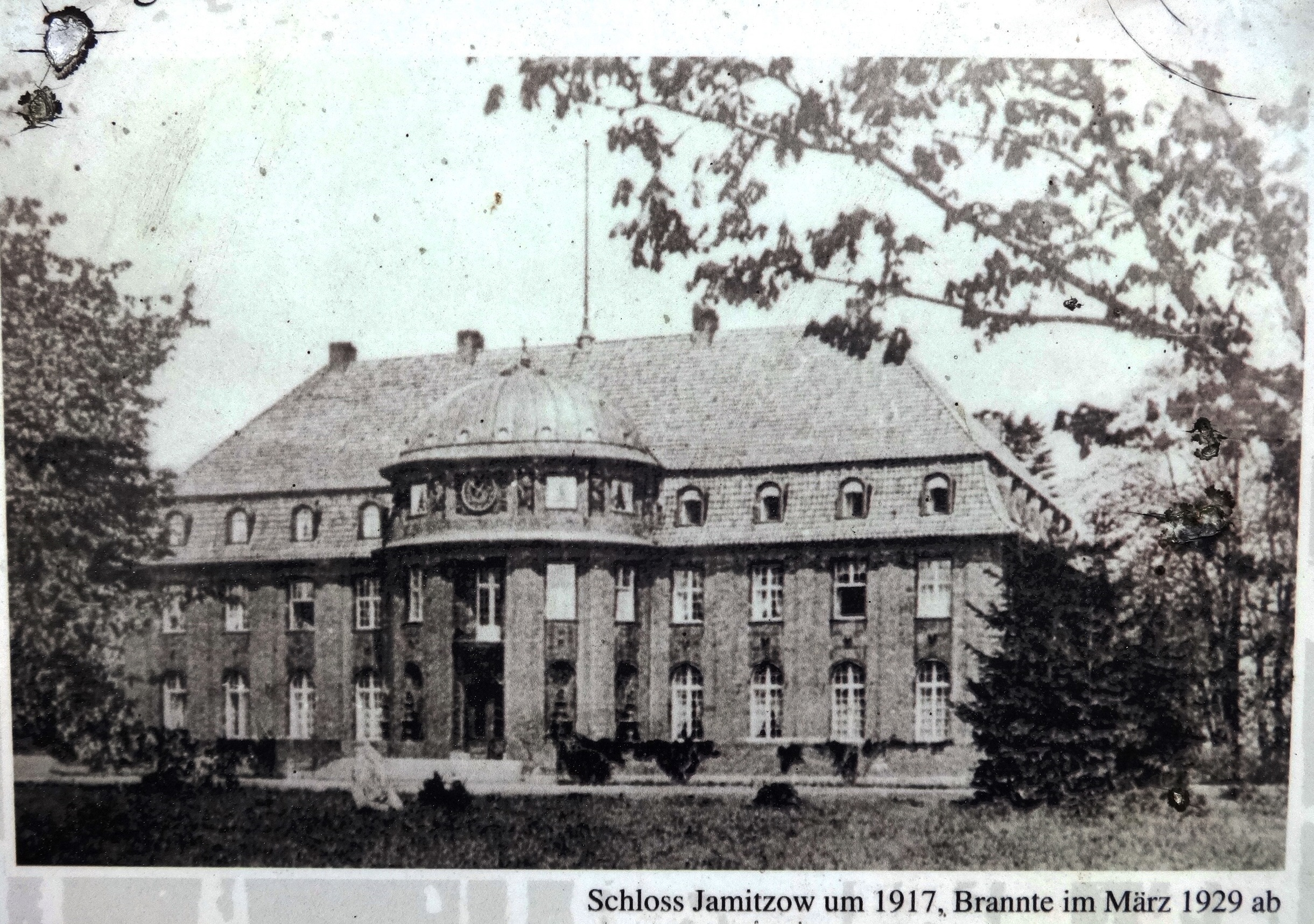 Informationen zu Buggenhagen auf einer öffentlich zugänglichen Tafel am Schlosssee in Buggenhagen, Vorpommern-Greifswald, Mecklenburg-Vorpommern